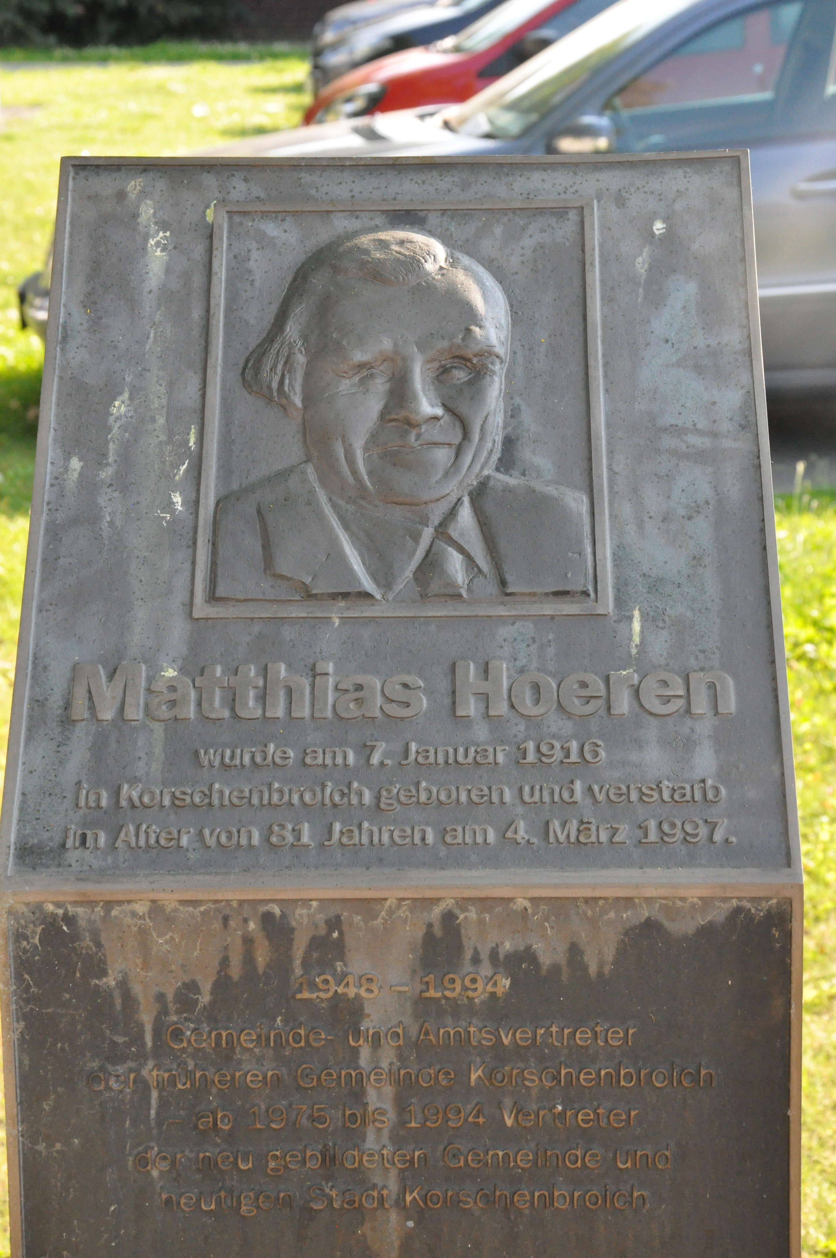 Denkmal für Matthias Hoeren, geschaffen von Dieter Patt.